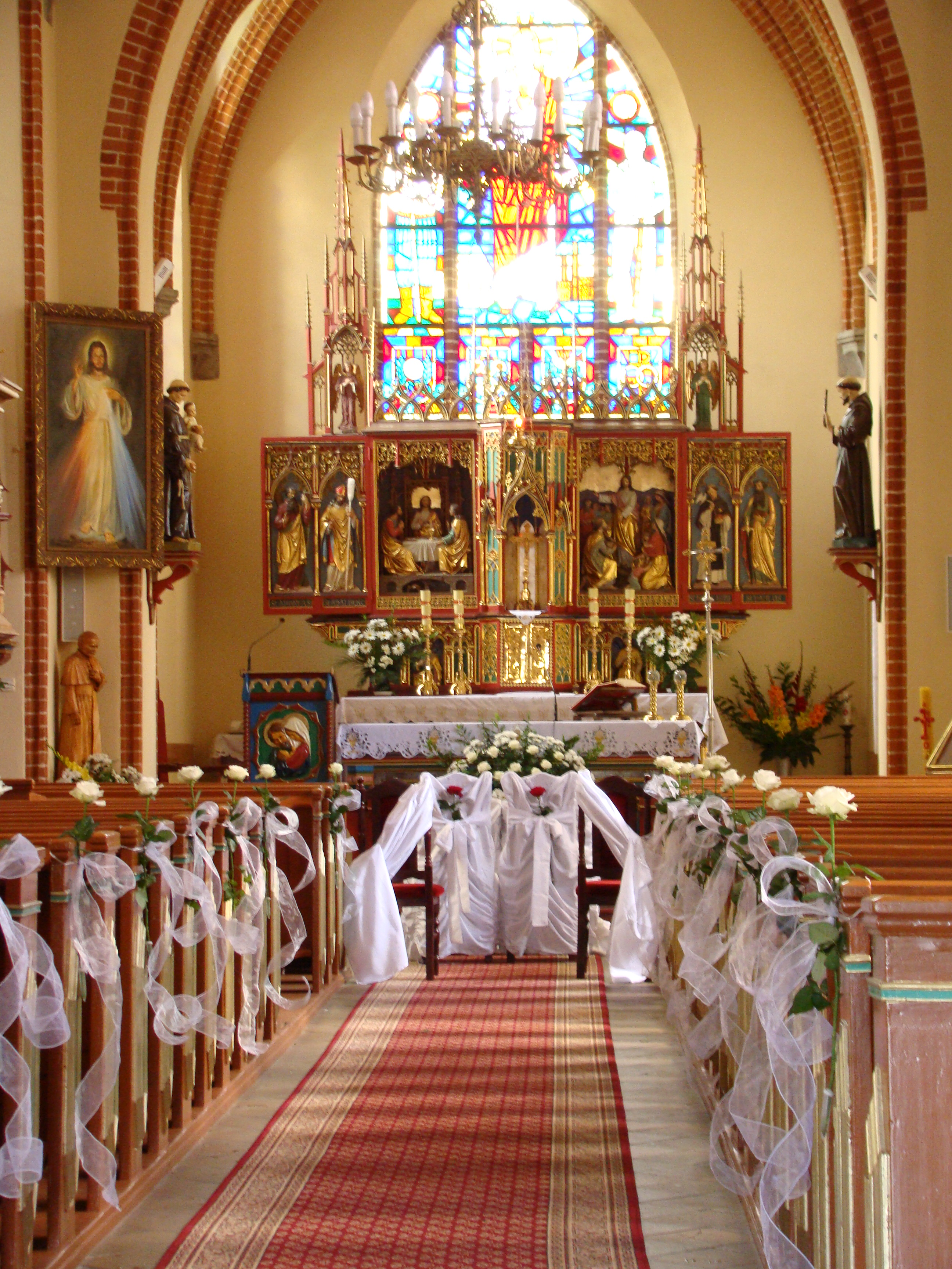 kościół par.p.w.Najświętszego Serca Pana Jezusa nr.NID woj. warmińsko-mazurskiego 2380 z 22.07.1996